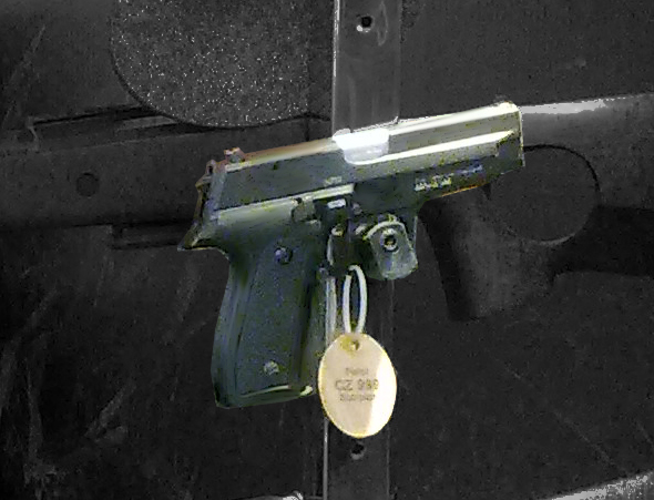 ЦЗ999 на сајму НиВО у Београду